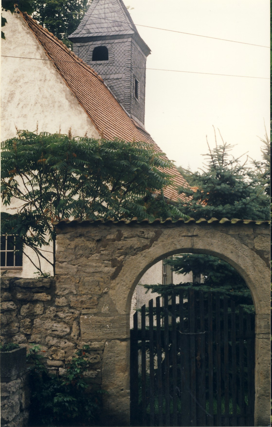 Dorfkirche von Kleinbucha 1996